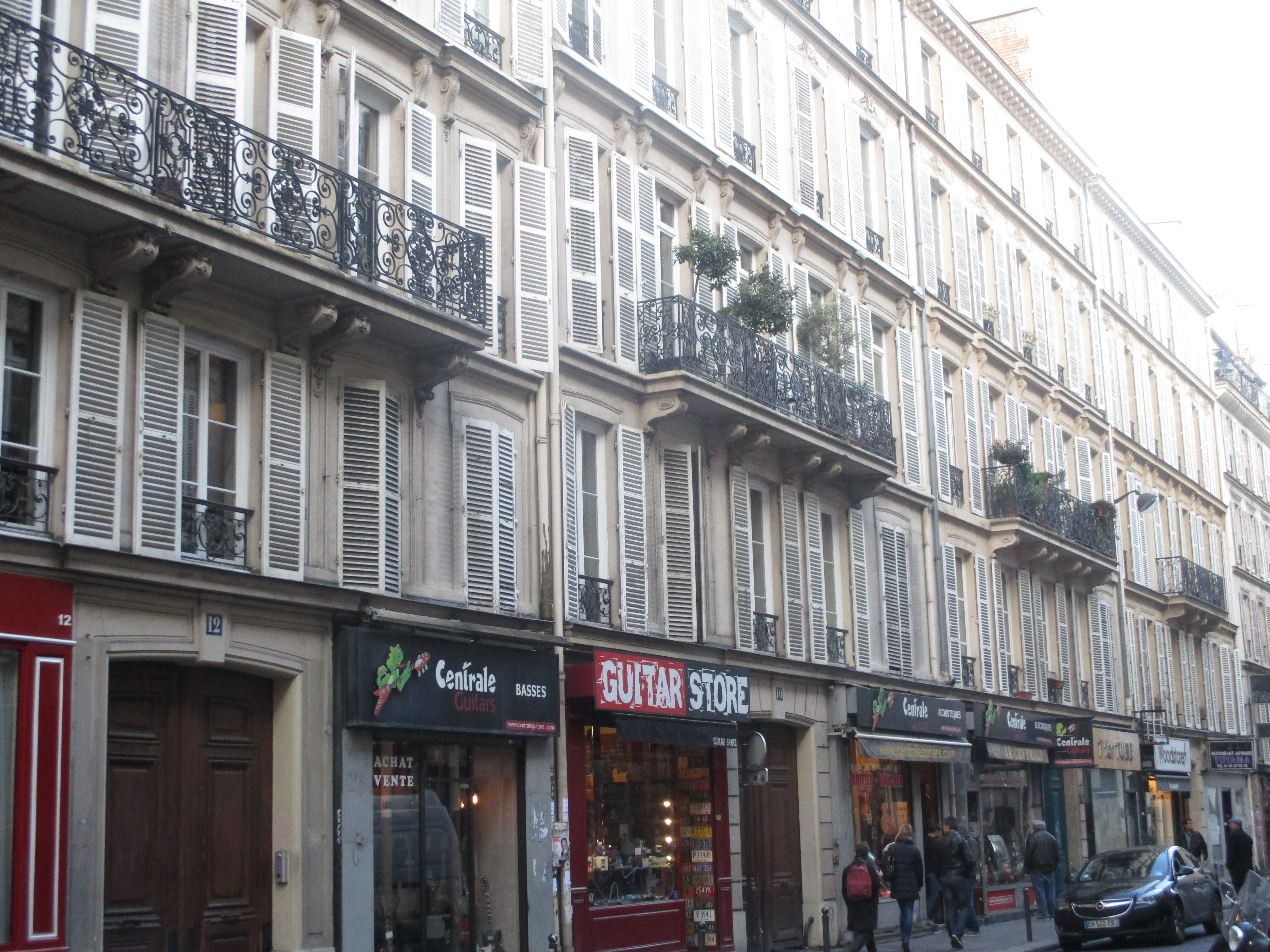 Immeubles des 12 et 14 rue de Douai à Paris IXe.